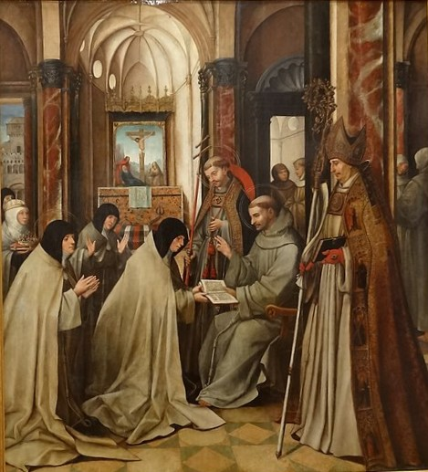 S. Francisco entregando os Estatutos da Ordem a Santa Clara é uma pintura a óleo sobre madeira pintada em 1515 na oficina de Jorge Afonso, mede 195 cm de altura e 174 cms de largura, que terá feito parte do Políptico do Convento da Madre de Deus e que se encontra actualmente no Museu Nacional de Arte Antiga, em Lisboa